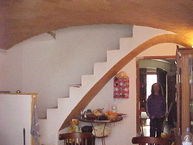 Bóveda catalana y bóveda tabicada de escalera. Tipo de bóveda tradicional en Cataluña. En una casa en Barcelona